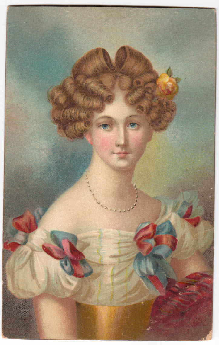 Fürstin Auguste von Liegnitz, Gemahlin Königs Friedrich Wilhelm III von Preußen. Postkarte